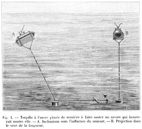 Torpille dormante ancêtre des mines marines